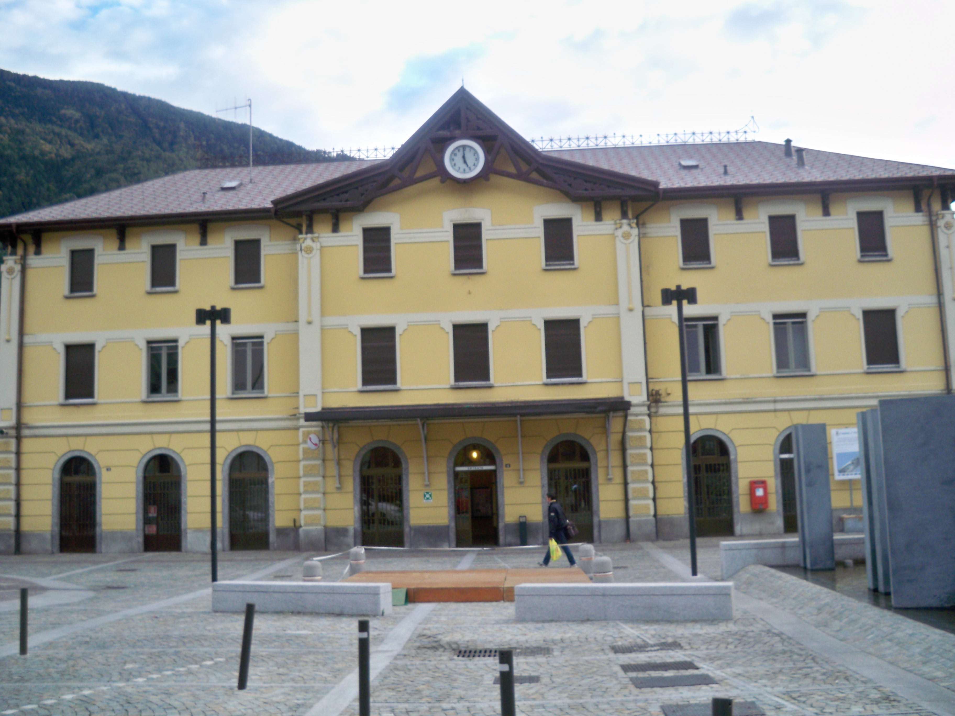 Gare de Tirano (SO), Italie